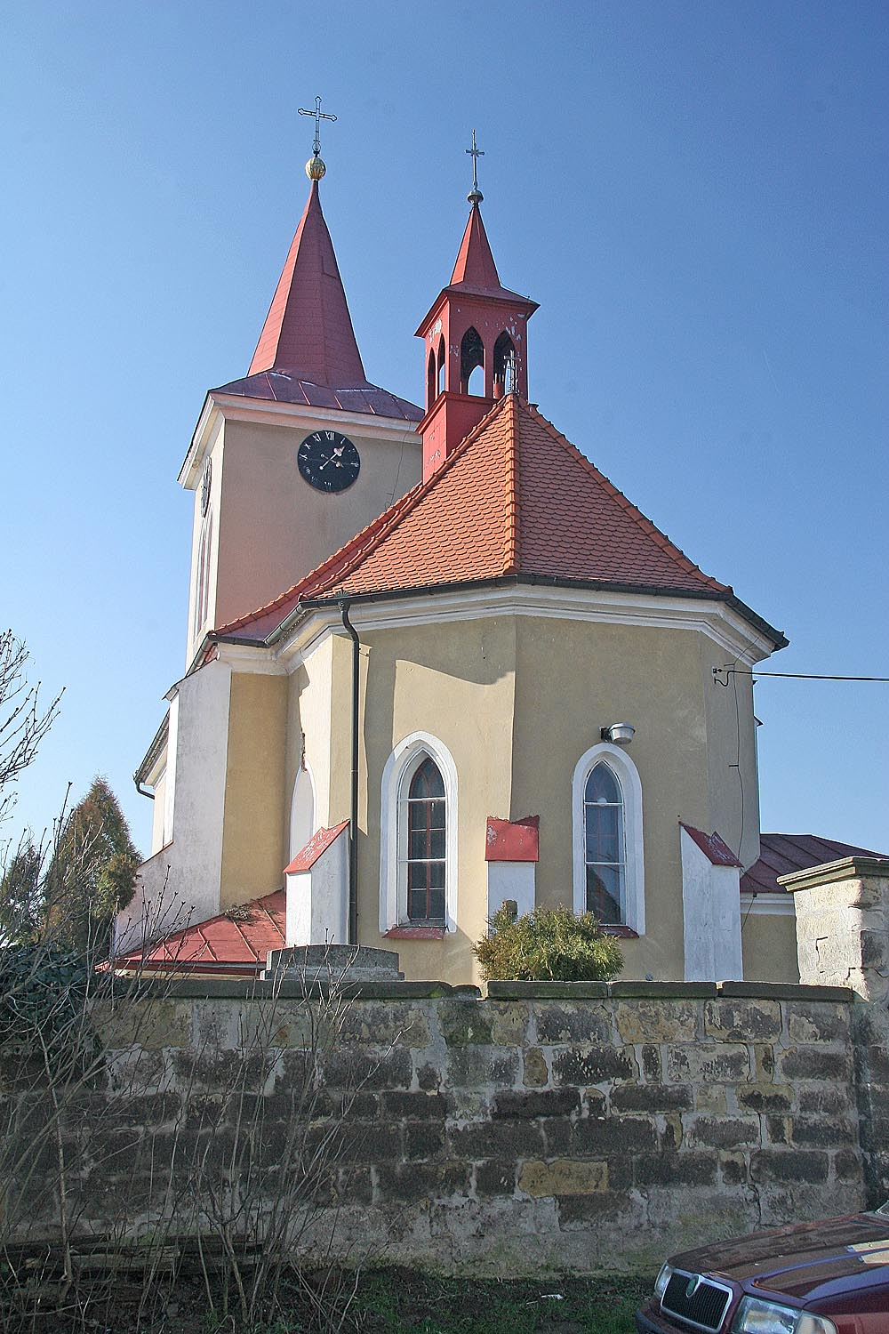 kostel Nanebevzetí Panny Marie v Bystřici, district Jičín autor:Prazak date: 17. 2. 2007